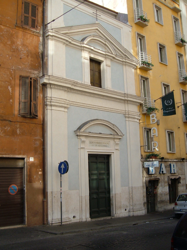 Chiesa di San Basilio agli Orti Sallustiani, nel rione Trevi a Roma. Foto personale.